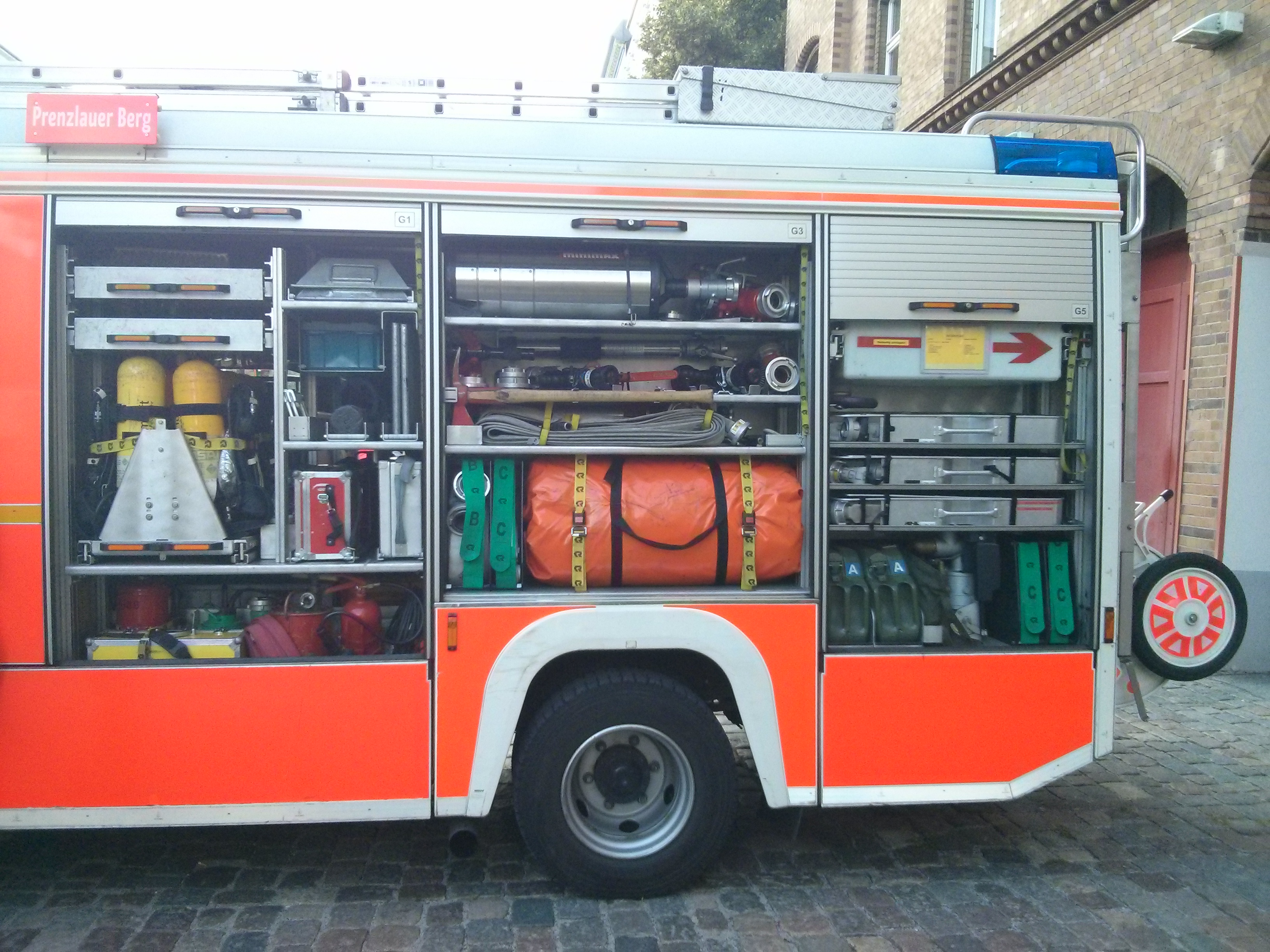 LHF 20/12, B-2054, Wache Prenzlauer Berg, Berlin